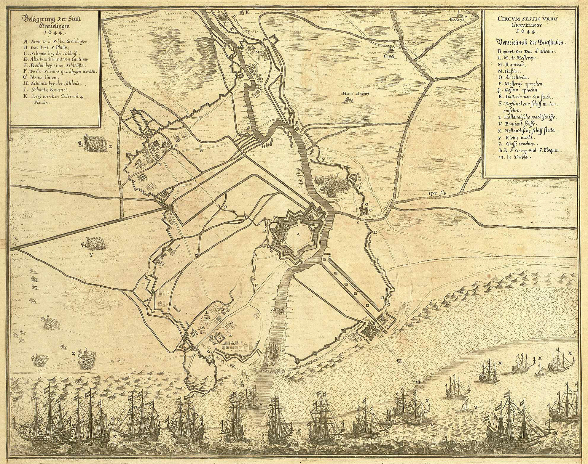 Belagerung der Statt Greuelingen (Gravelines)